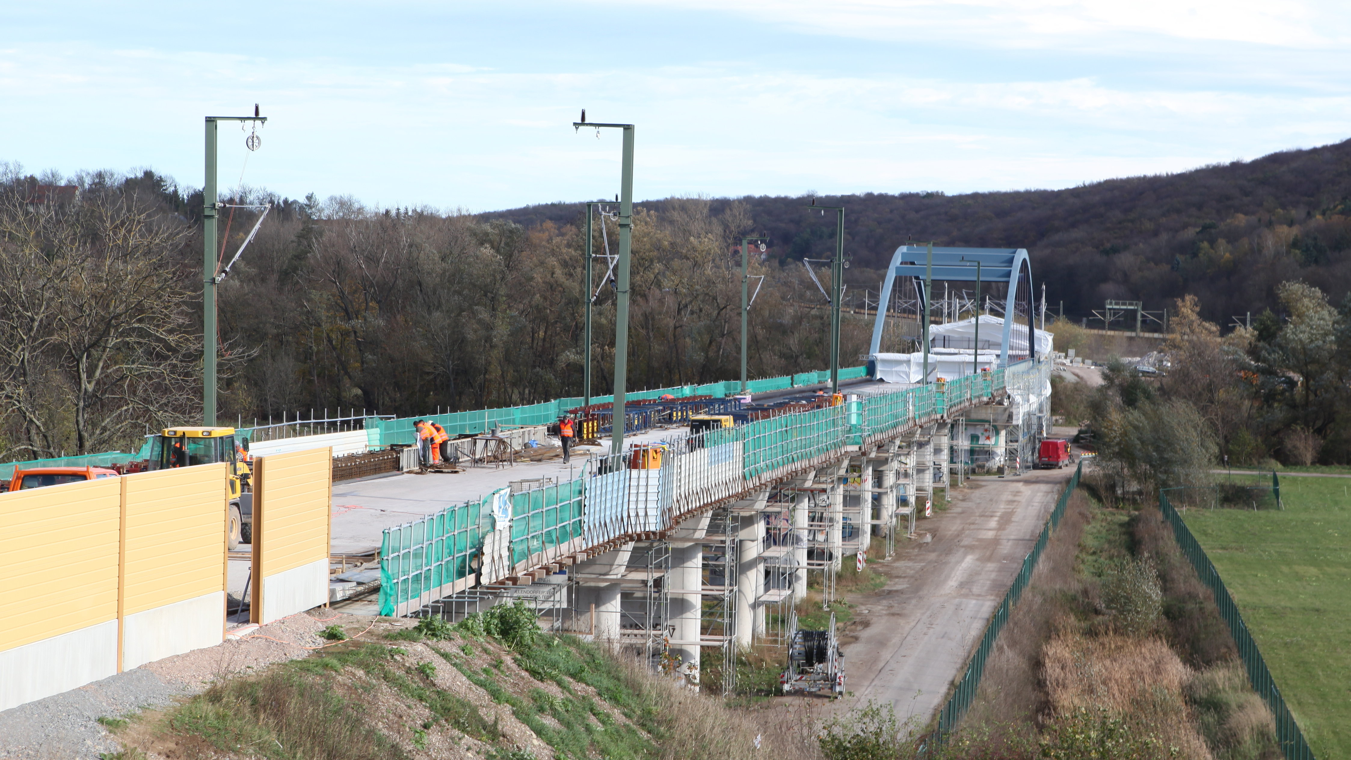 EÜ Geratal, Instandsetzungsmaßnahmen im Oktober 2013